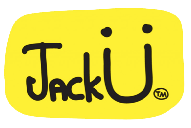 Логото на Jack Ü